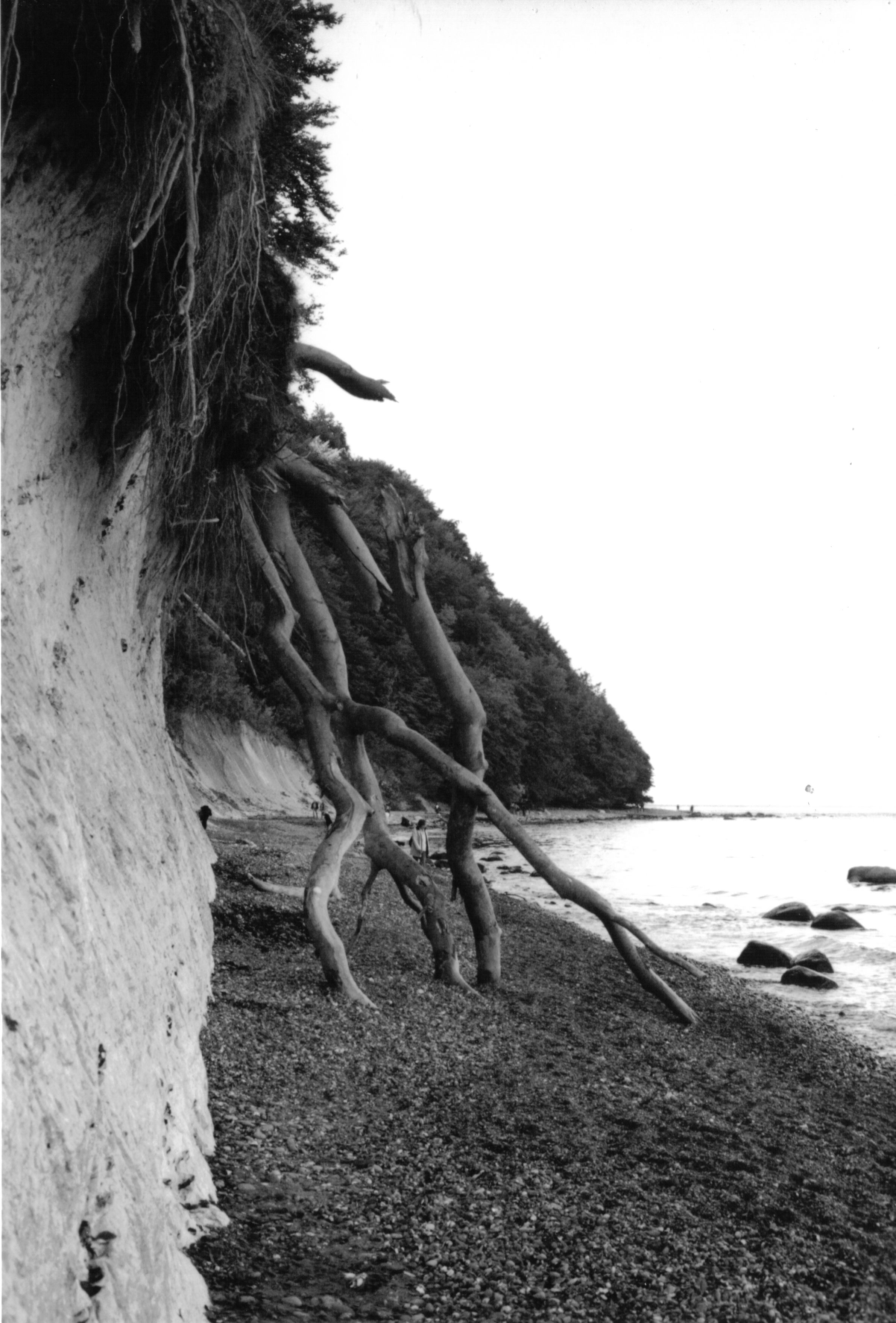 Königsstuhl Rügen, Foto gescannt